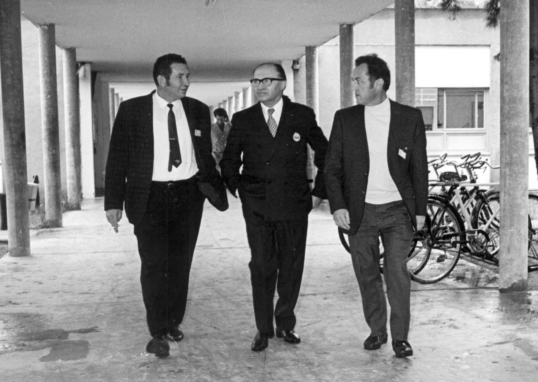 זכאי משמאל מארח את מנחם בגין ברפאל.